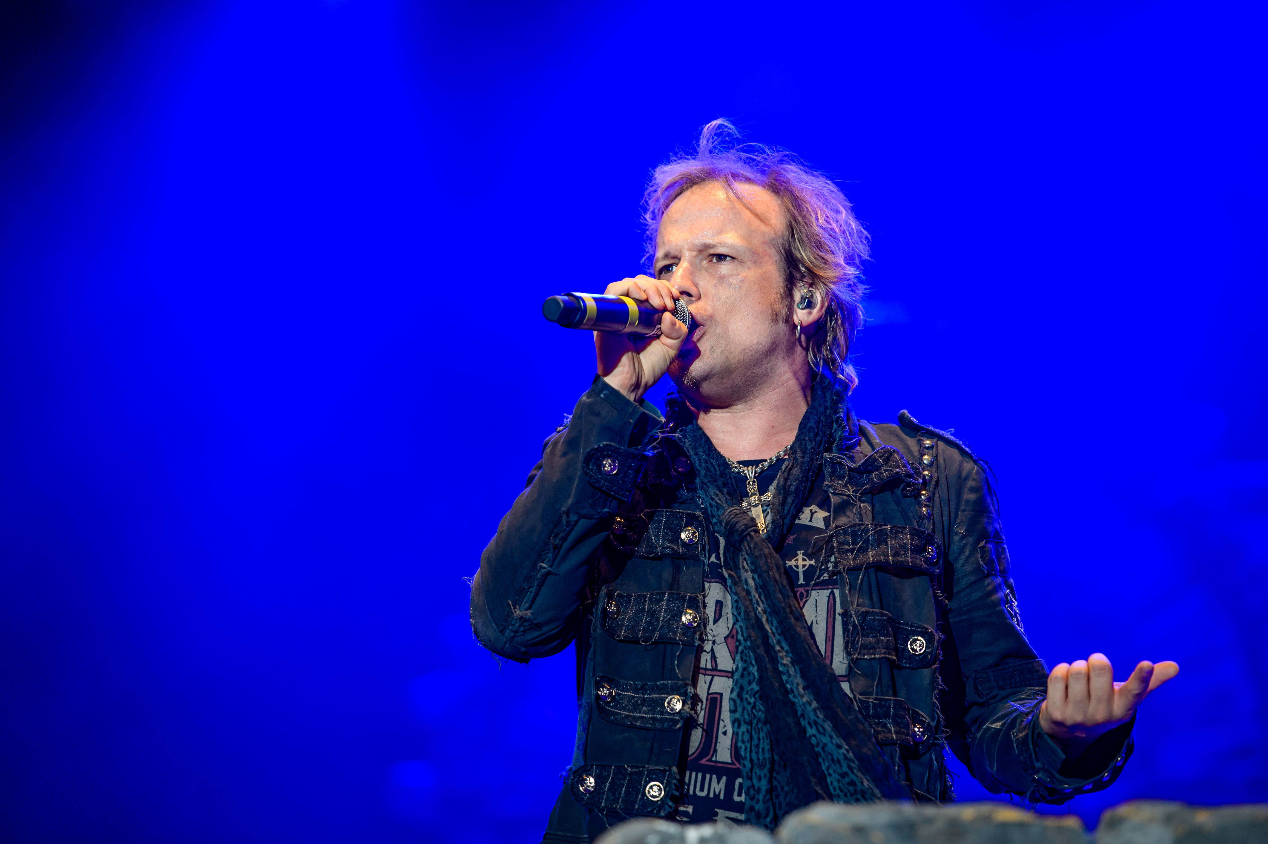 'RockHarz Open Air 2016; Ballenstedt': 'Avantasia'